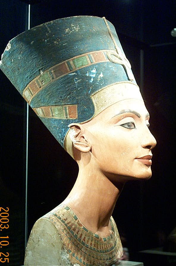 Nofertiti büsztje (Berlin, Neues Museum)